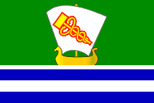 Флаг Зеленодольского района Татарстана